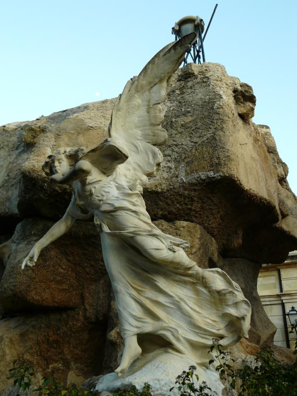 "Ángel del silencio" (1903). Escultura en el panteó familiar d'Agustín Gisbert Vidal. Obra de Lorenzo Ridaura Gosálbez, cementeri d'Alcoi (Alacant).